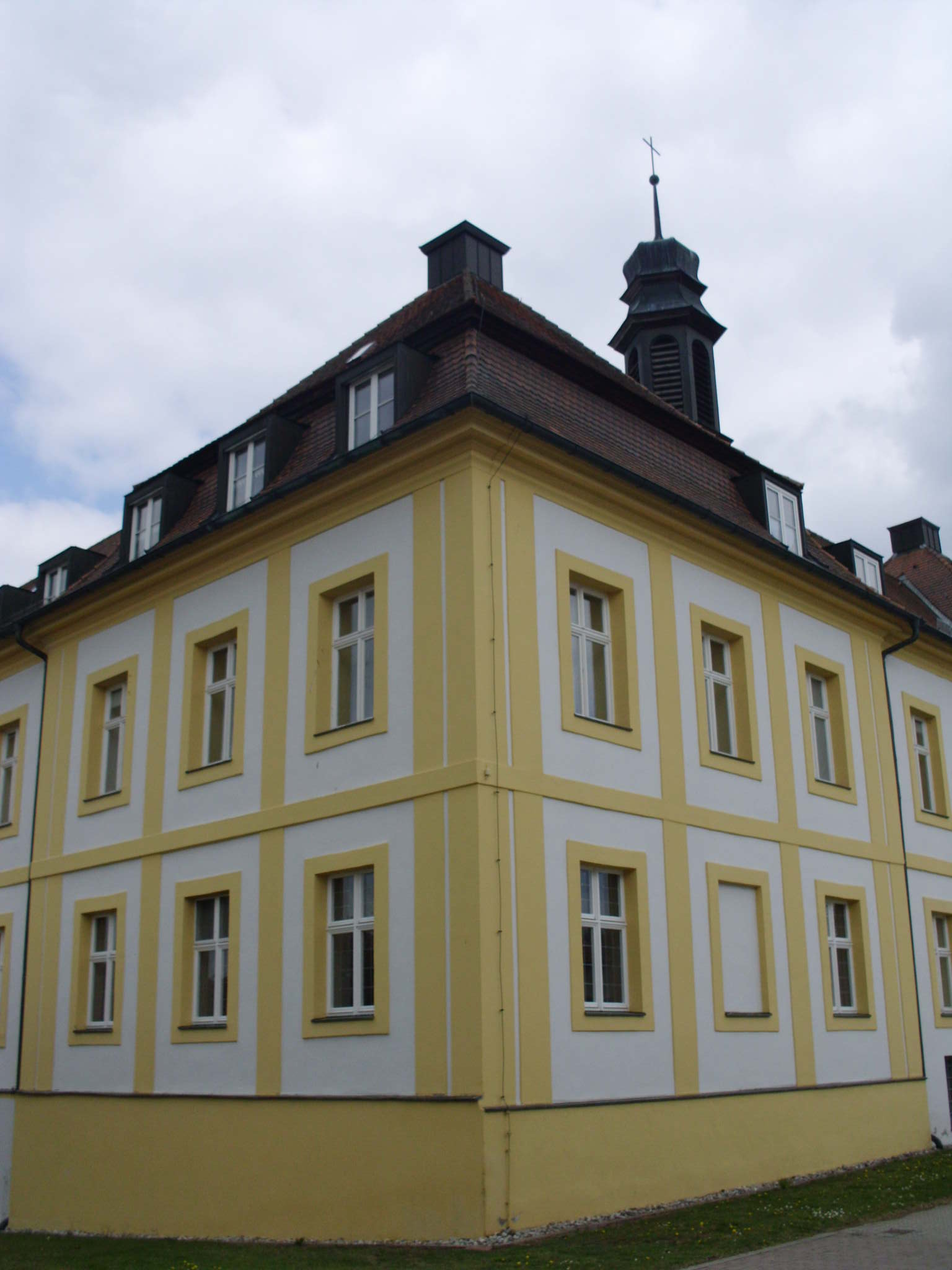 Absberg, Landkreis Weißenburg-Gunzenhausen (Bayern), Ehemaliges Deutschordensschloss, Südostecke (Schlosskapelle, heute Kath. Pfarrkirche St. Ottilia)